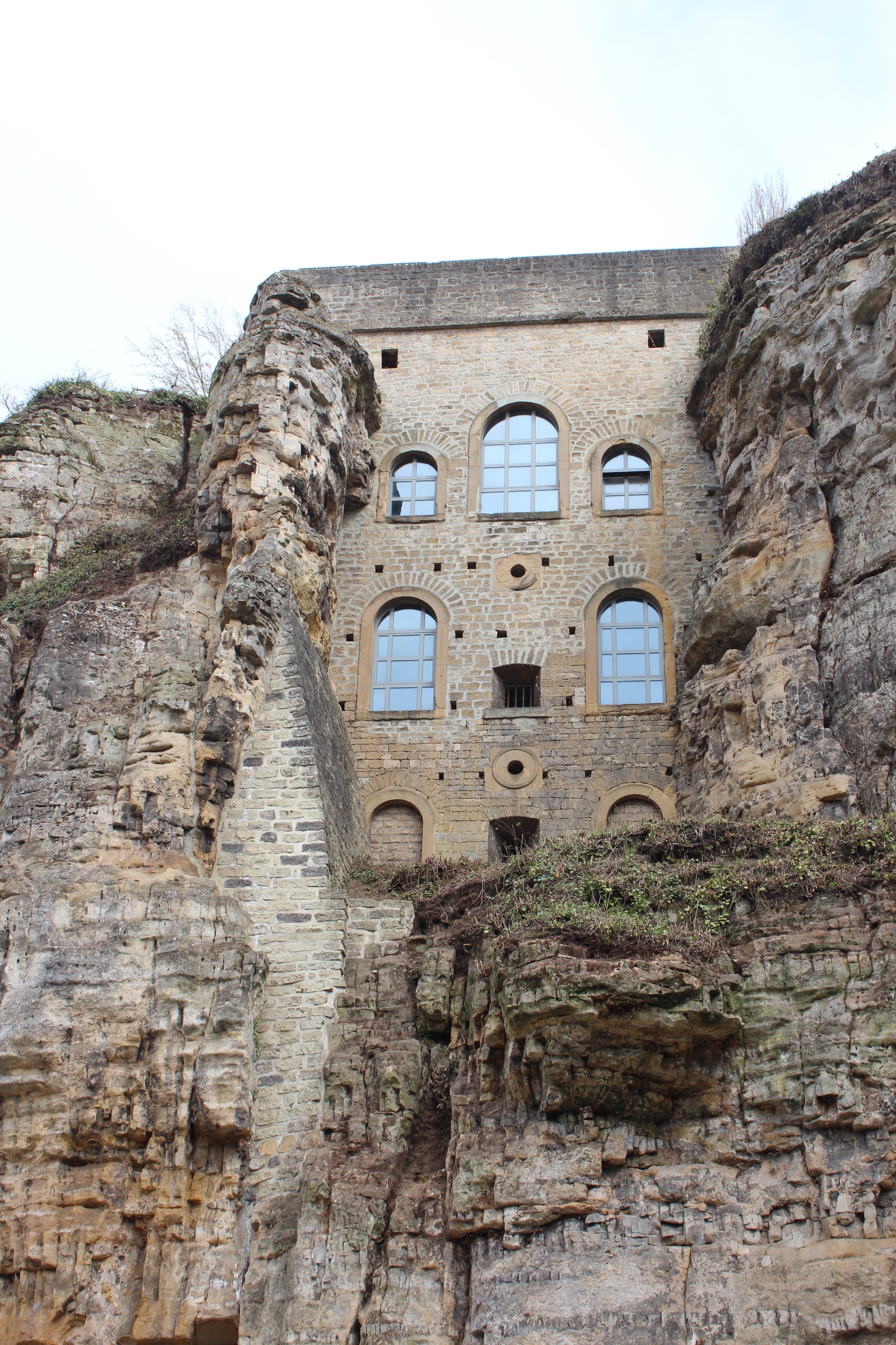 Die sog. Felsenbatterie-Kasematte, in einem Felsspalt des Rham-Plateaus, in Luxemburg-Stadt; Überbleibsel der Festung Luxemburg.